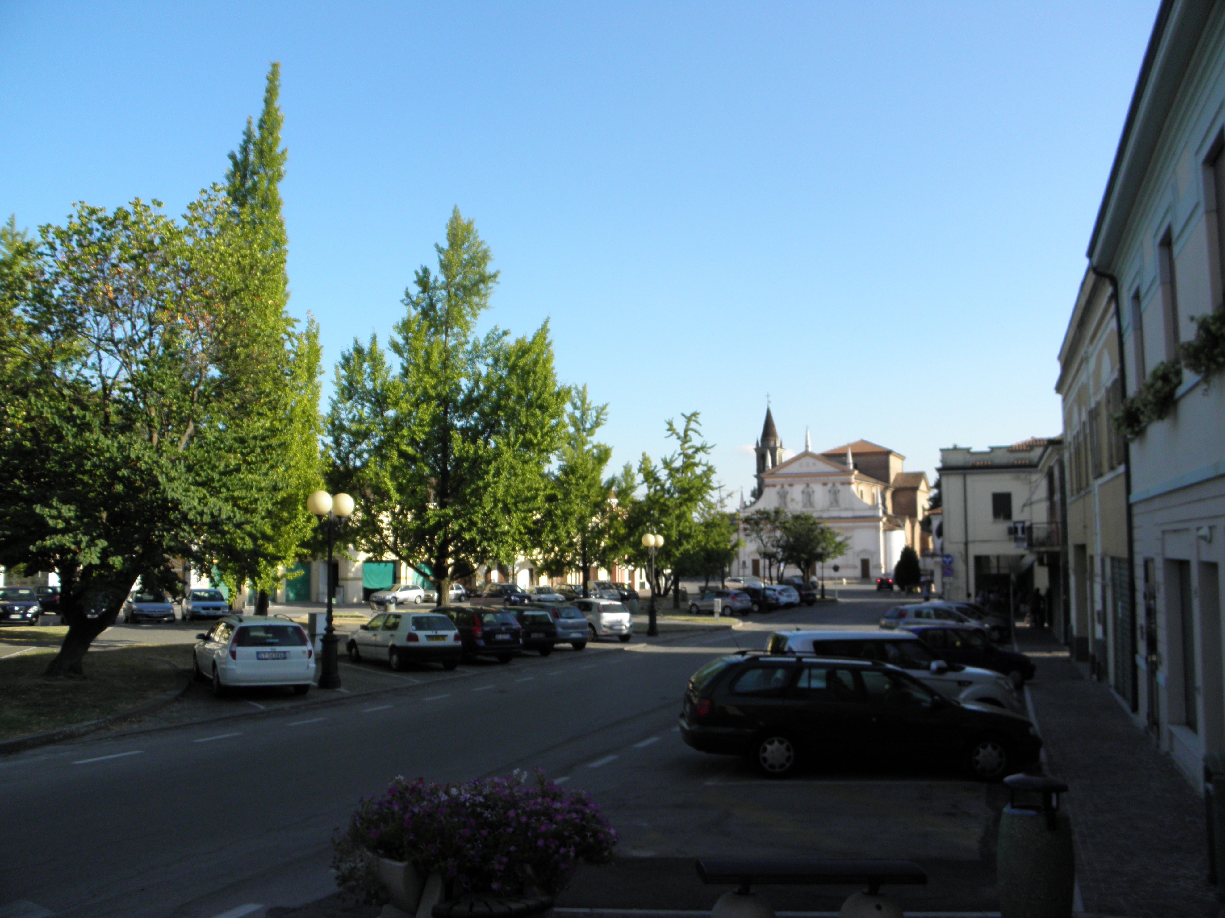 Castelguglielmo, vista sulla piazza Vittorio Veneto. Sullo sfondo si trova la chiesa parrocchiale di San Nicola di Bari.